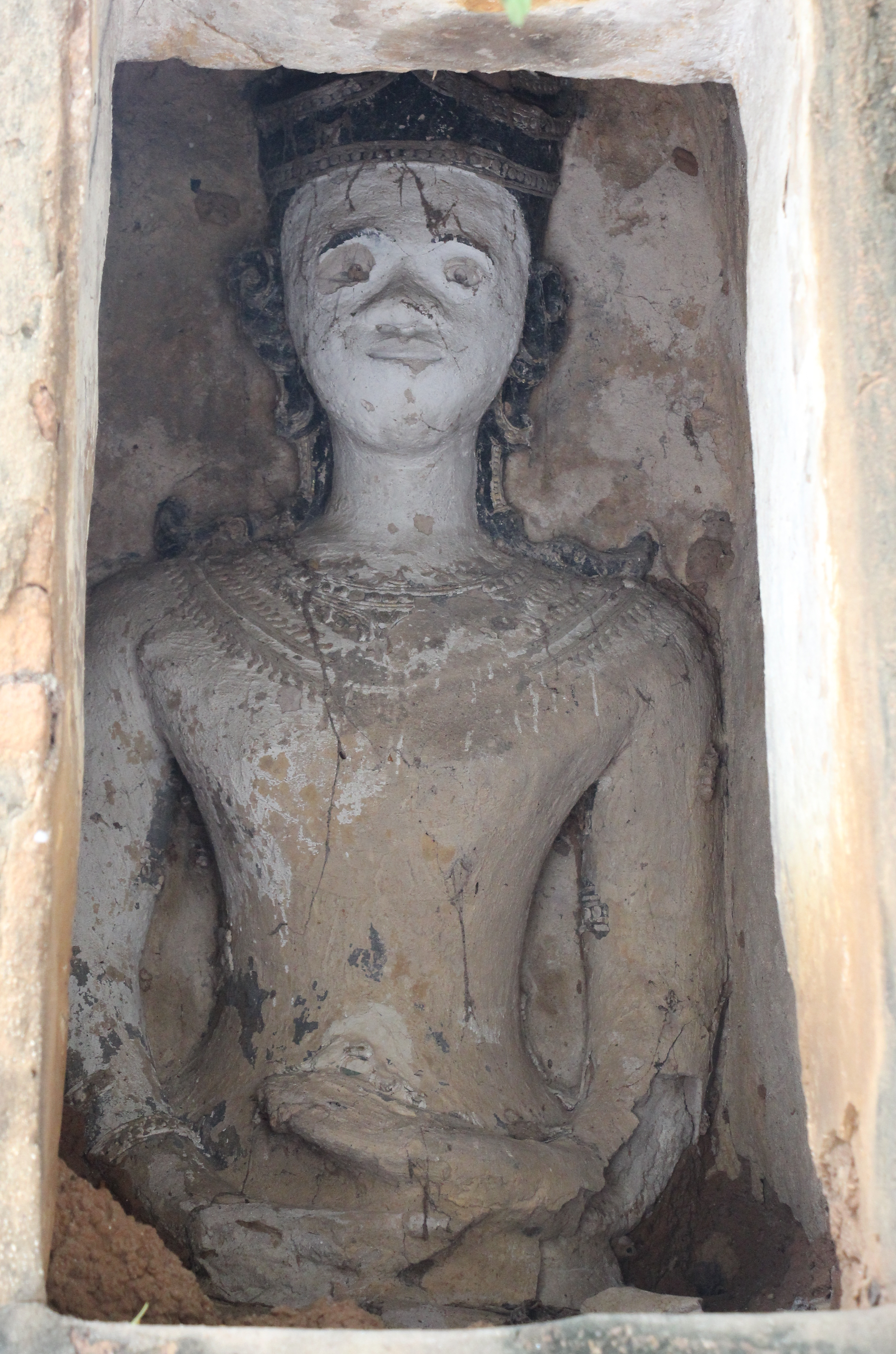 Reo tahiti: หลวงพ่อพระเจ้าใหญ่มิ่งเมือง